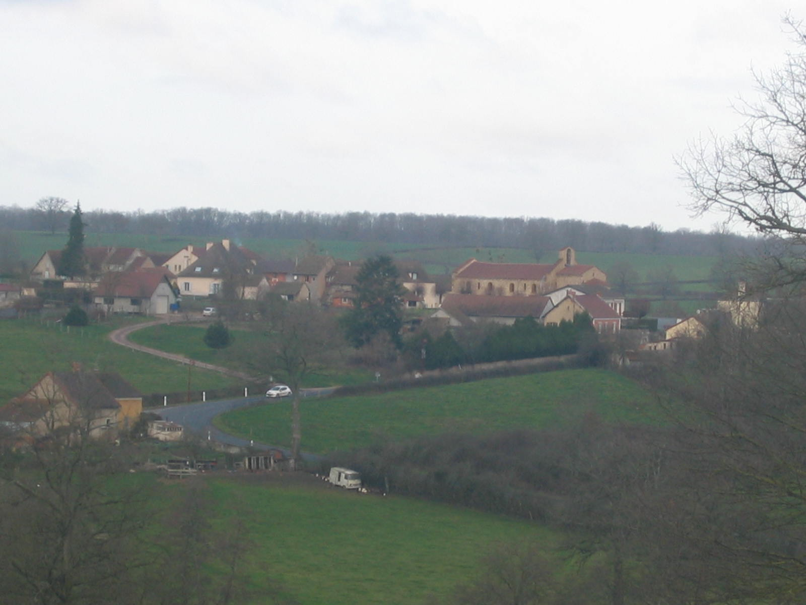 Bourg de Neuilly vu de la motte Monin (domaine des Bertaux)